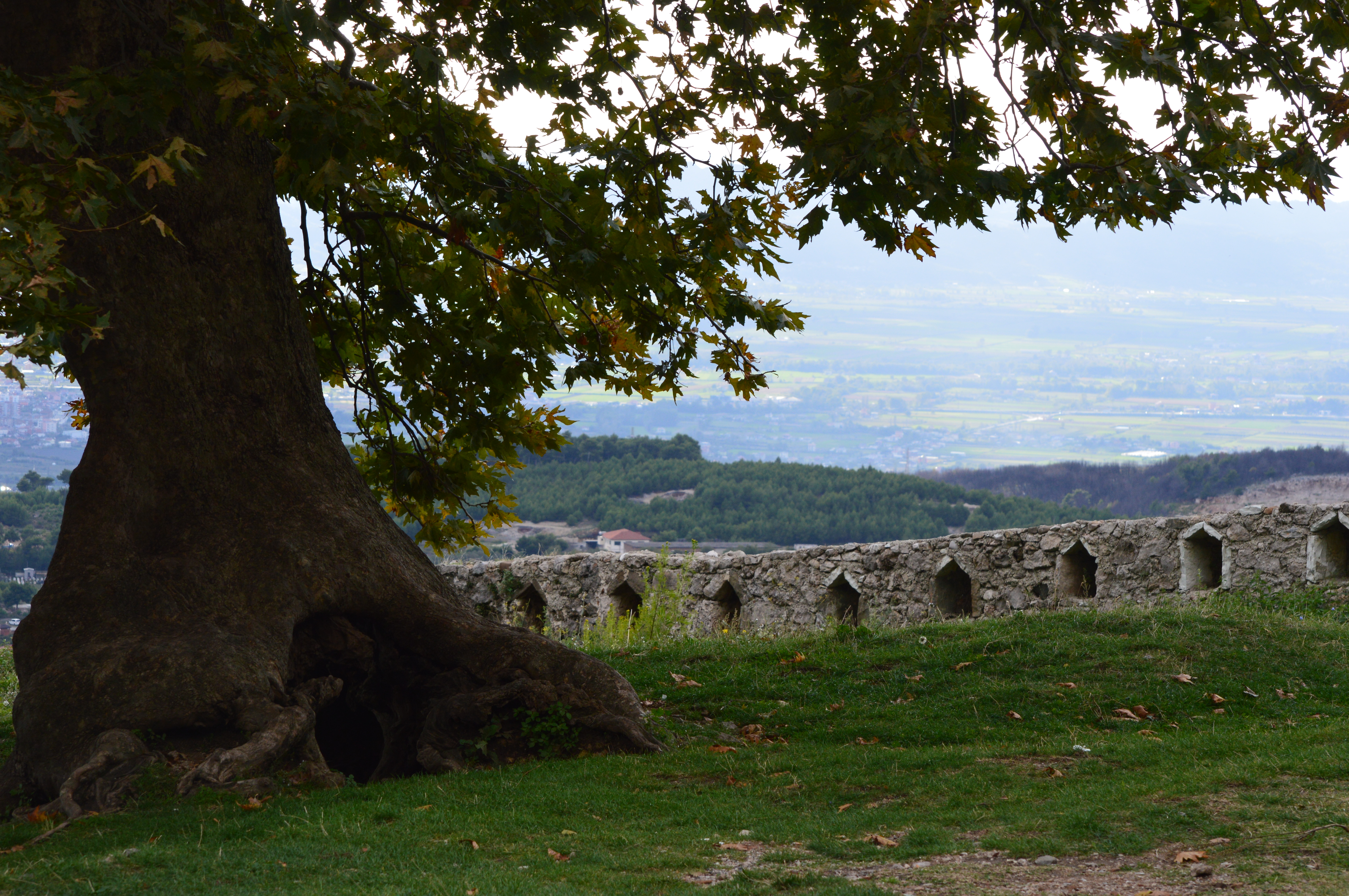 Hrad v Kruji